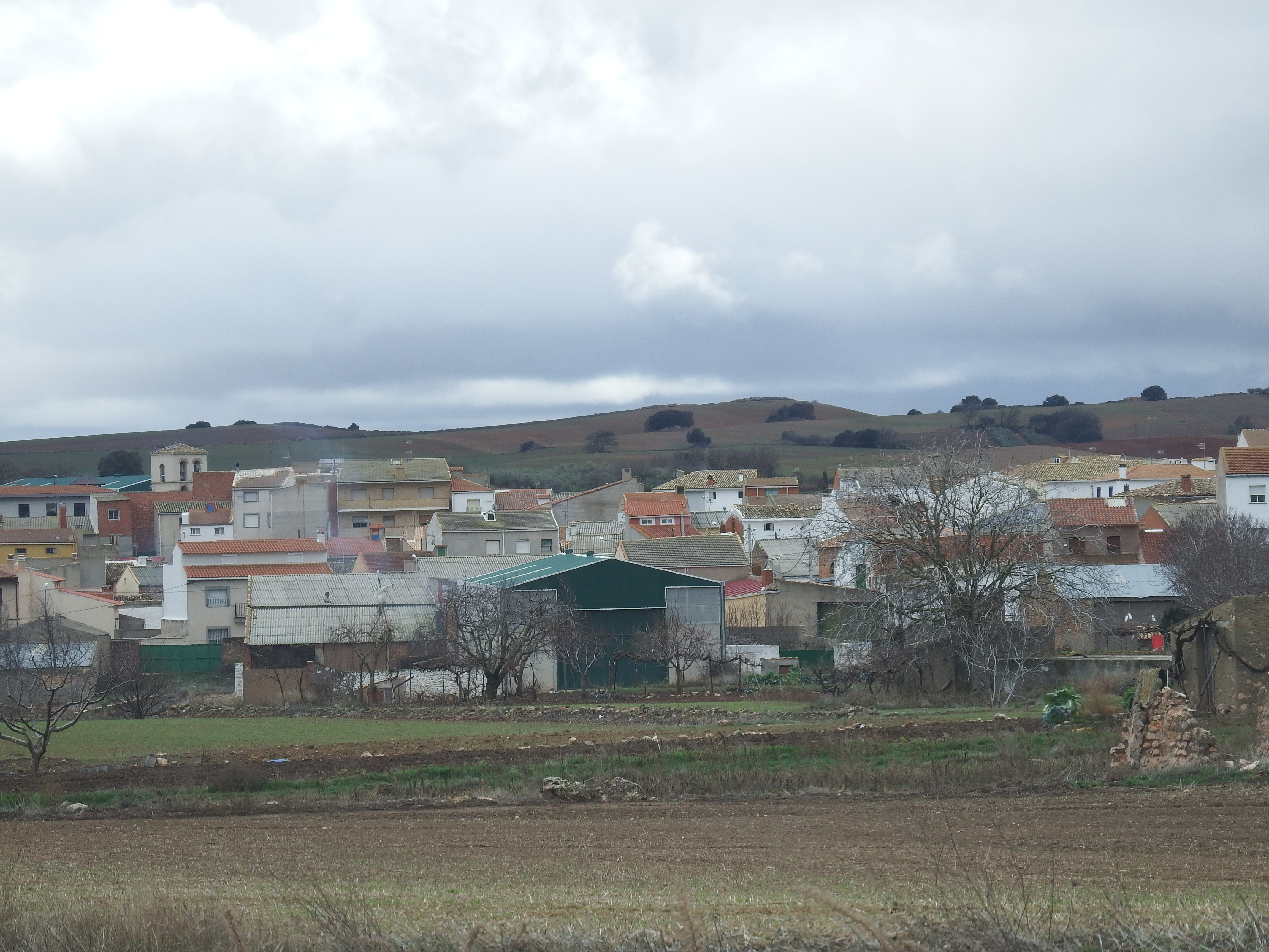 Villarejo-Periesteban